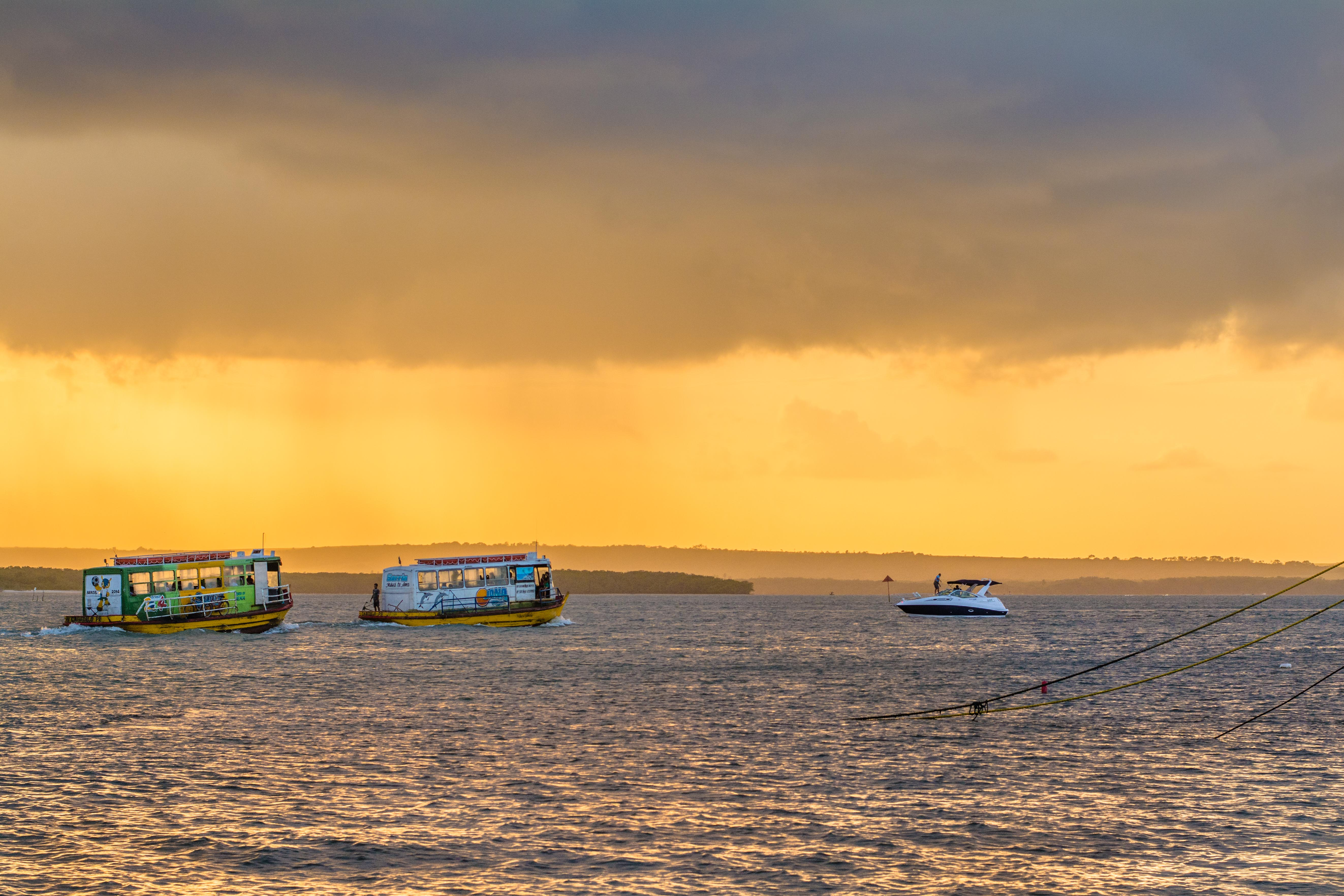 Porto de Cabedelo - PB